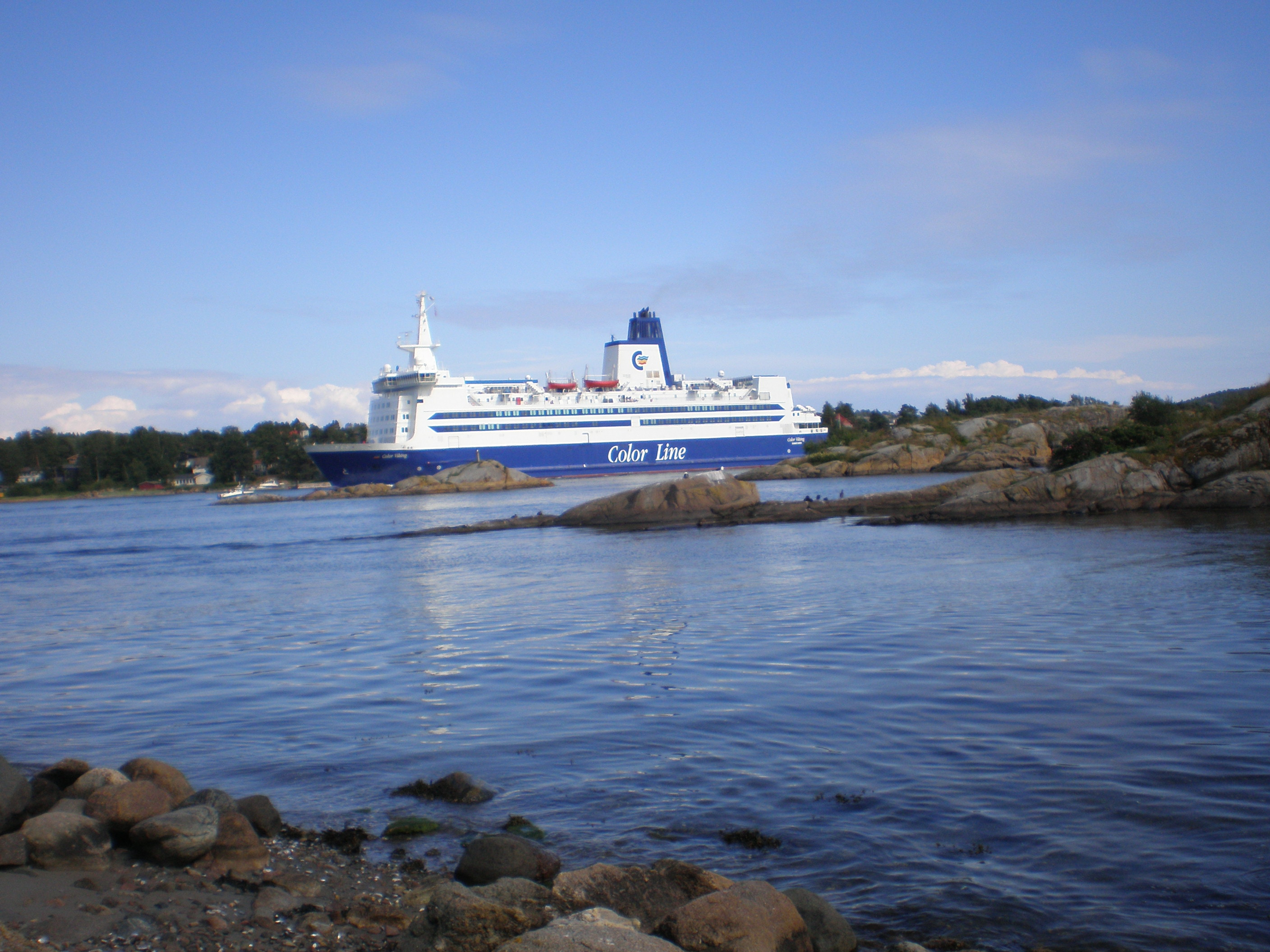 Sandefjord, Norwegia